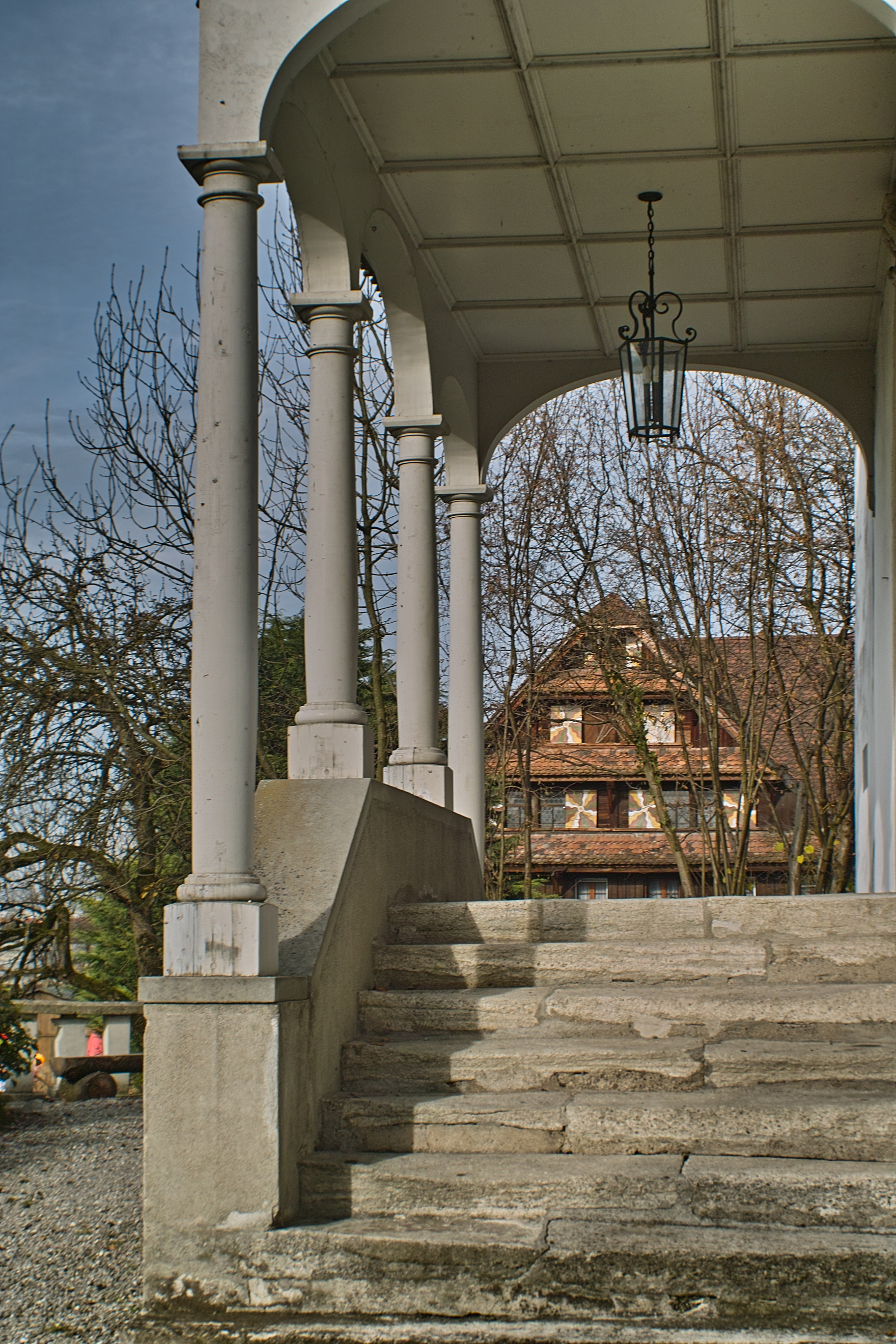 Treppe vor der Alten Kirche in Boswil